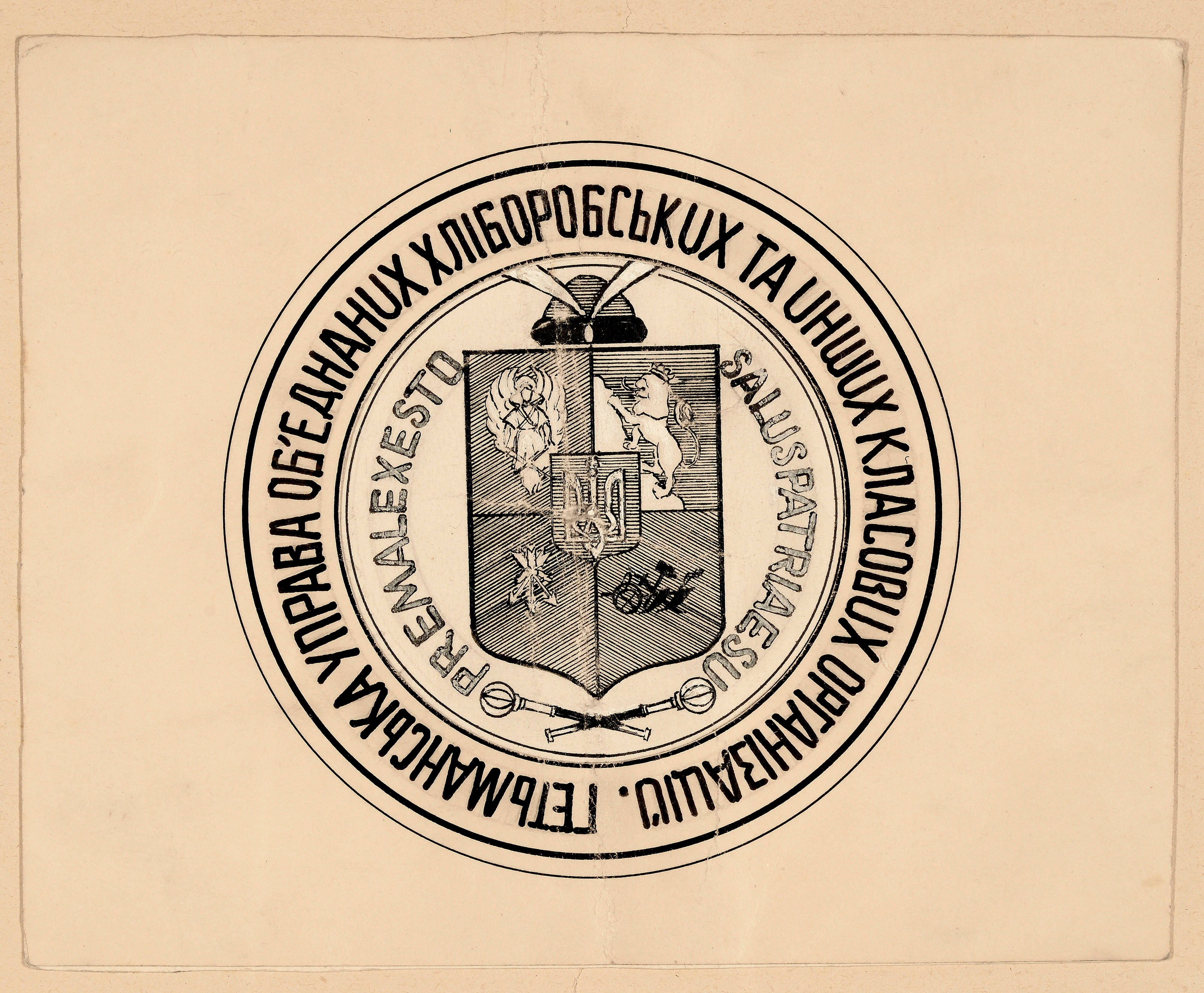 Печатка Гетьманської Управи УСХД